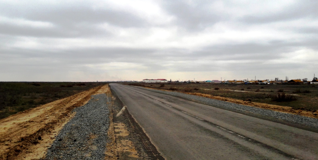 Қазақша (кирил): с.Кудряшов